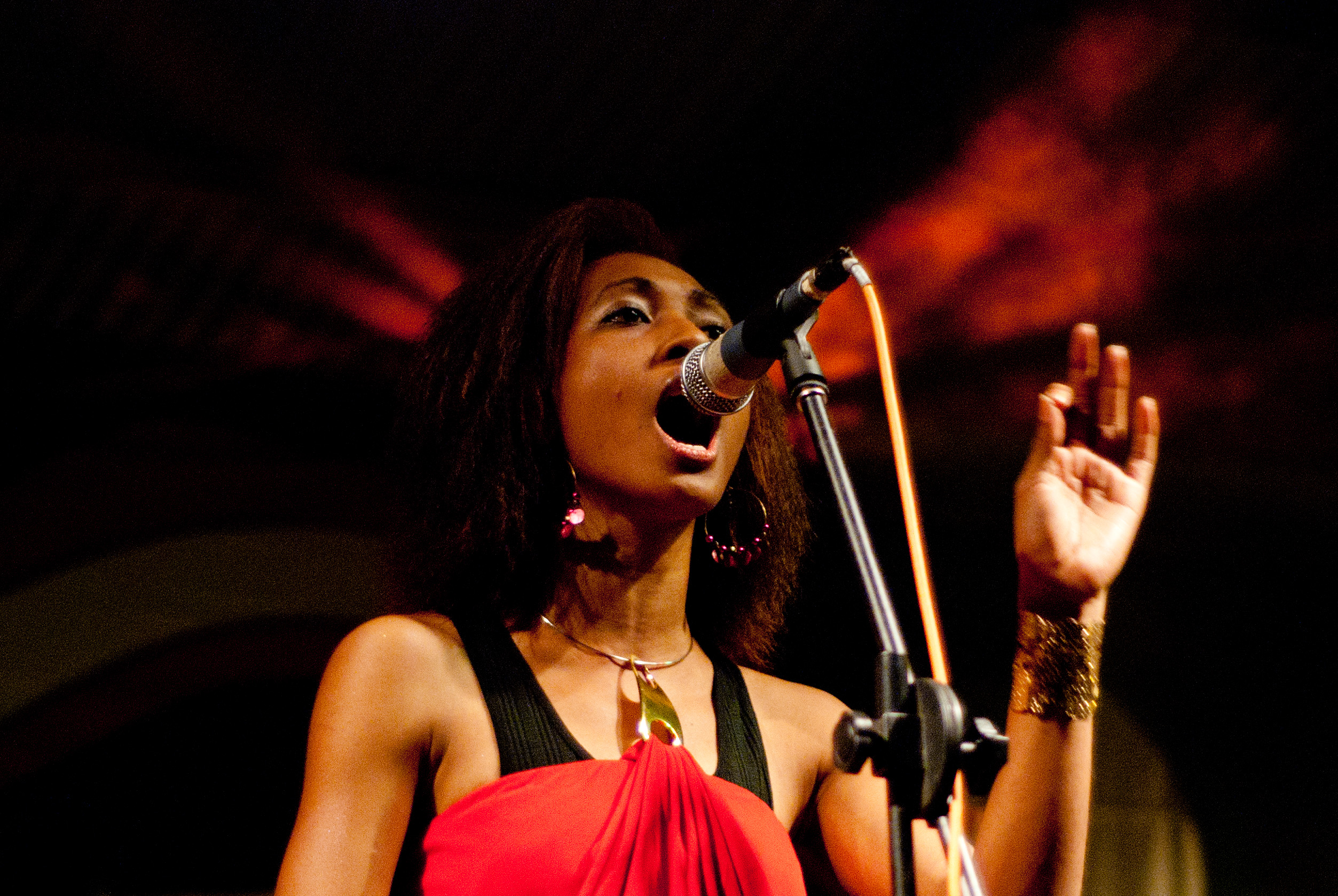 Women in Music